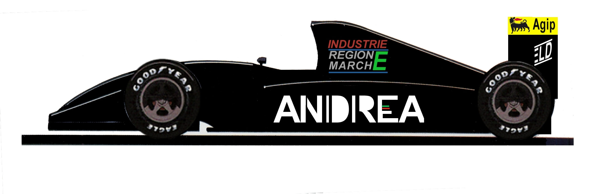 Andrea Moda S921 Formel-1-Auto in der Lackierung Ungarn 1992